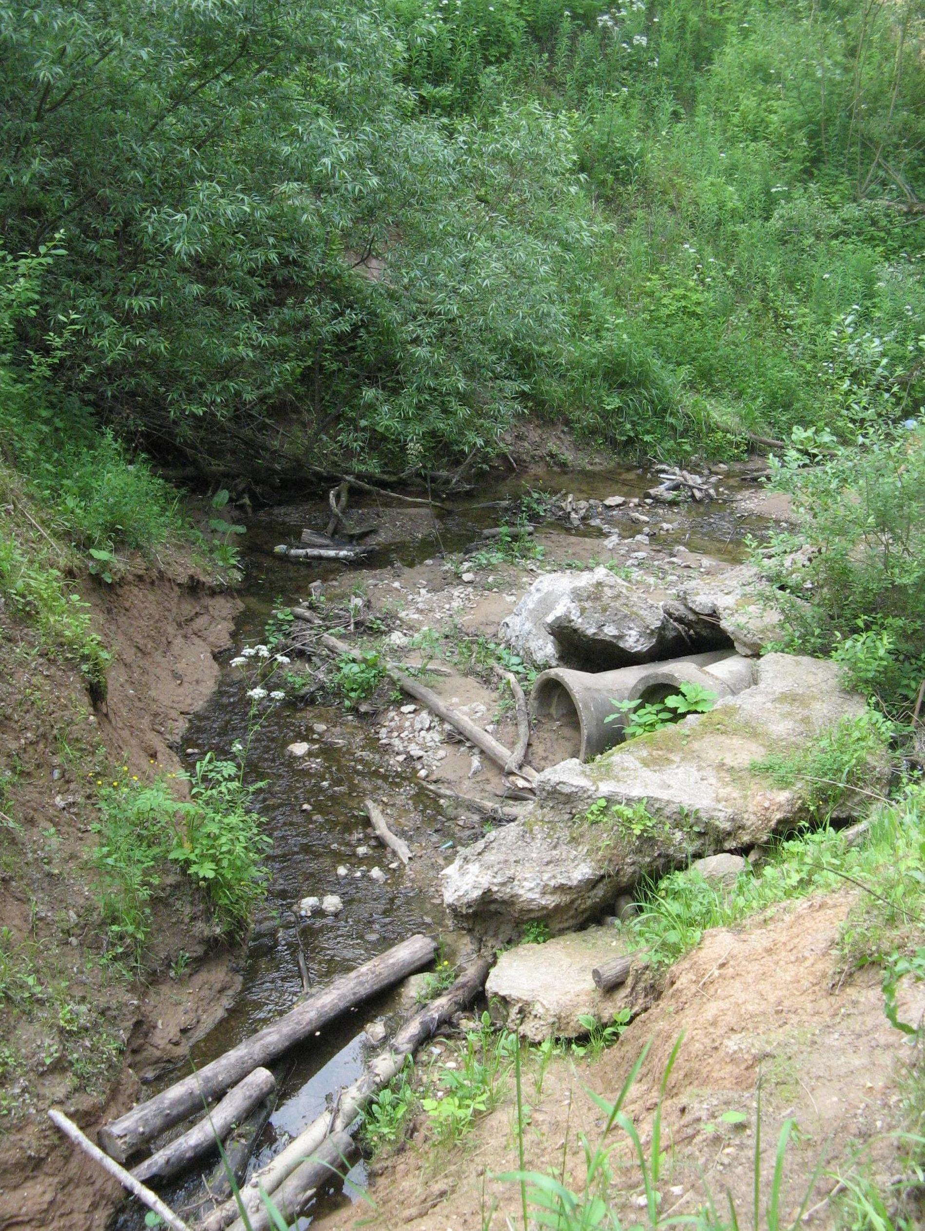 Деревлёвский ручей (Битцевский лес)